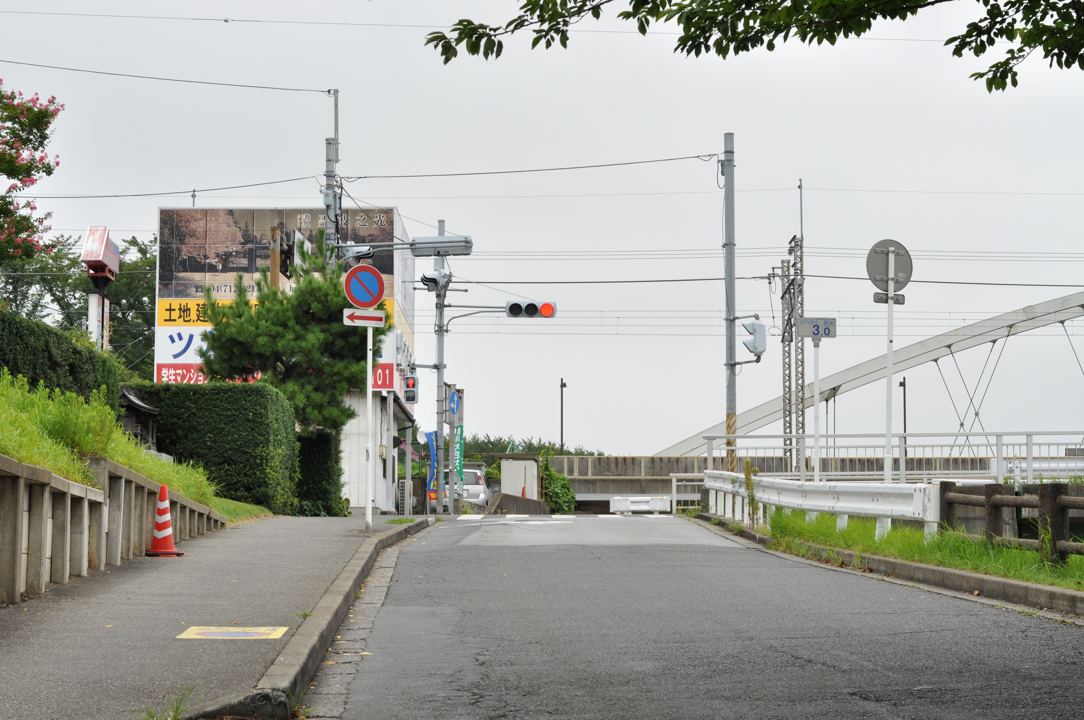 流山街道沿いの橋